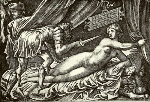 Tarquin et Lucrèce de Georges Reverdy, gravure sur cuivre au burin